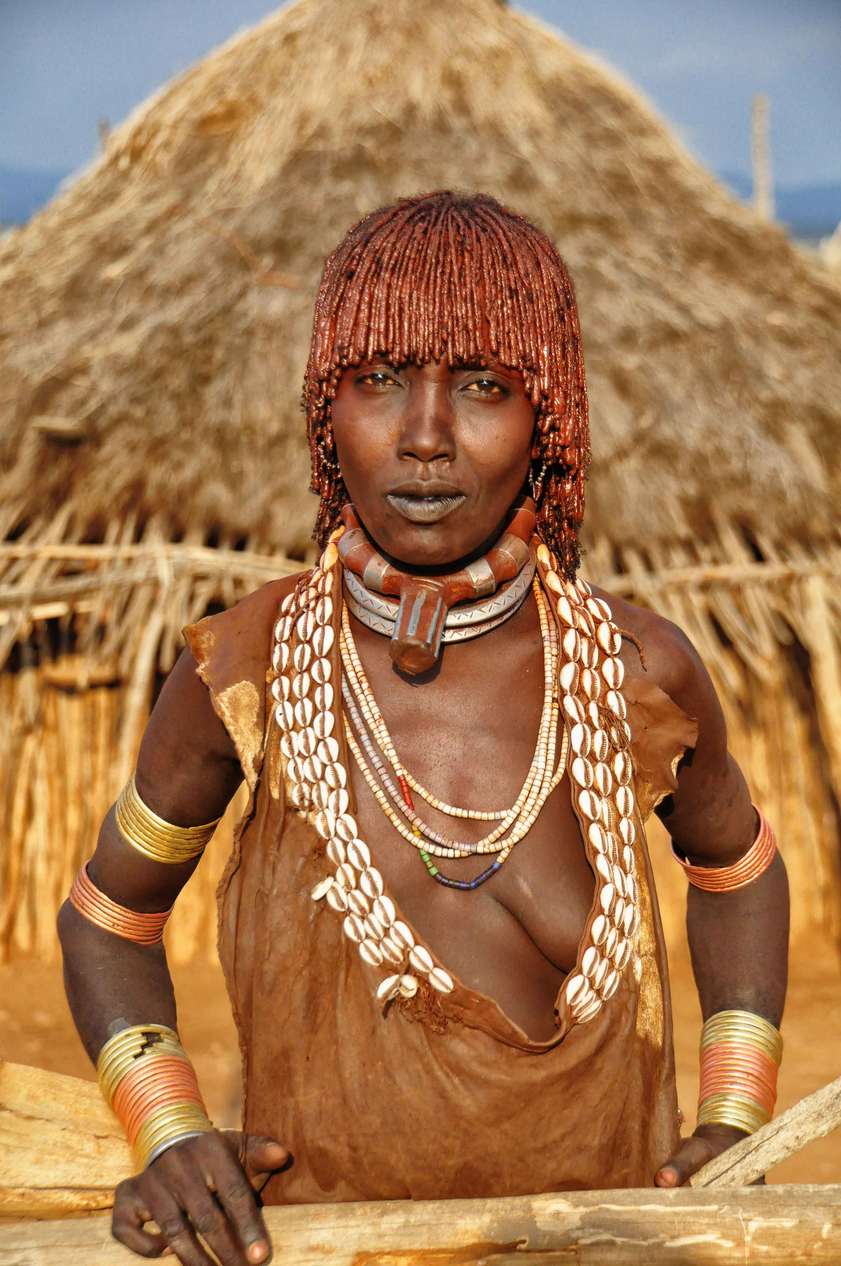 Hamer Woman